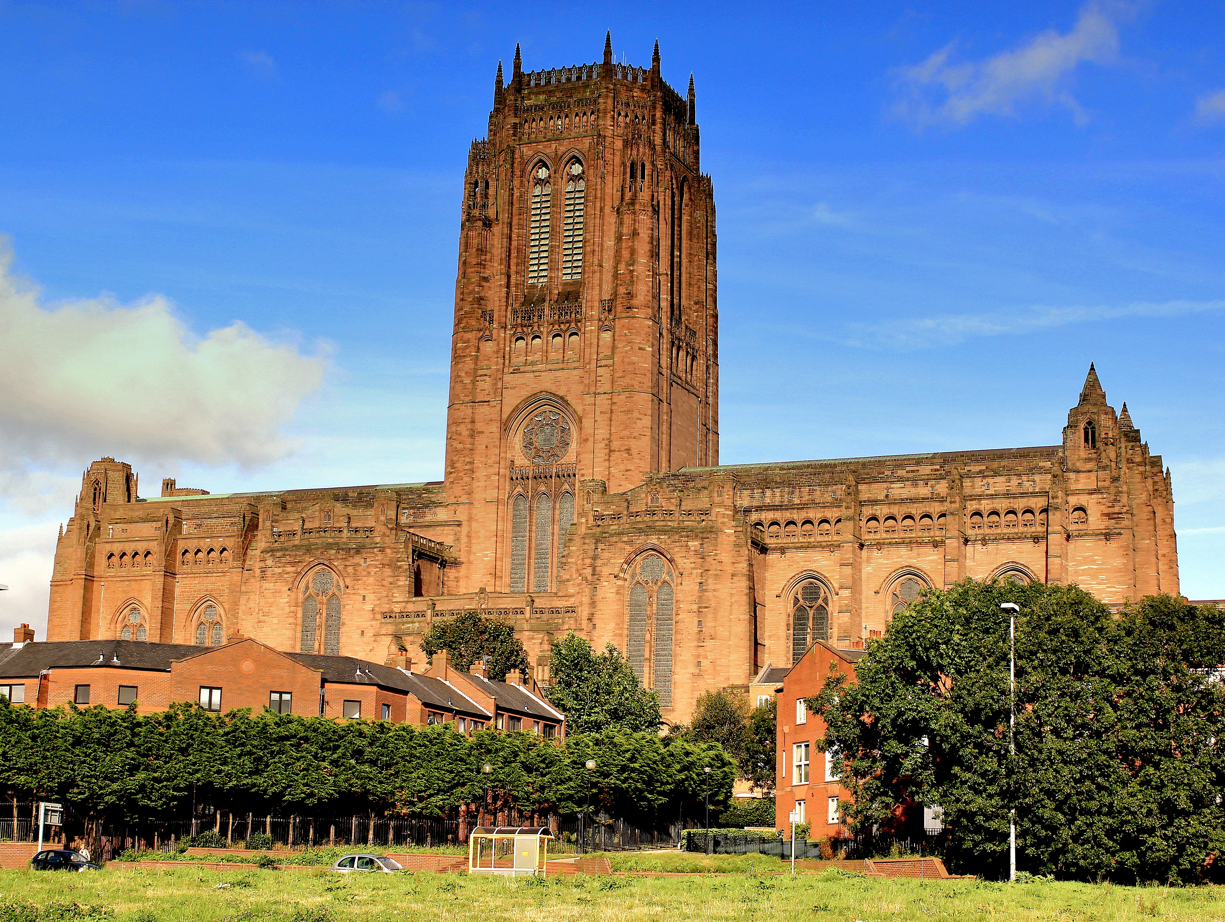 LIVERPOOL ANGLICAN CATHEDERAL SEP2012